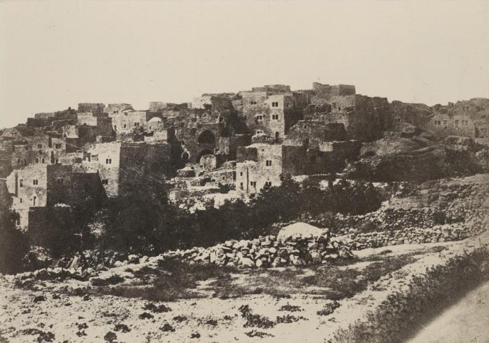 Beit-Lehem - Jerusalem.